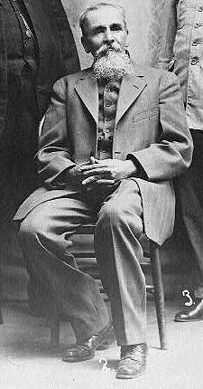 El Coronel Sebastian Carranza.